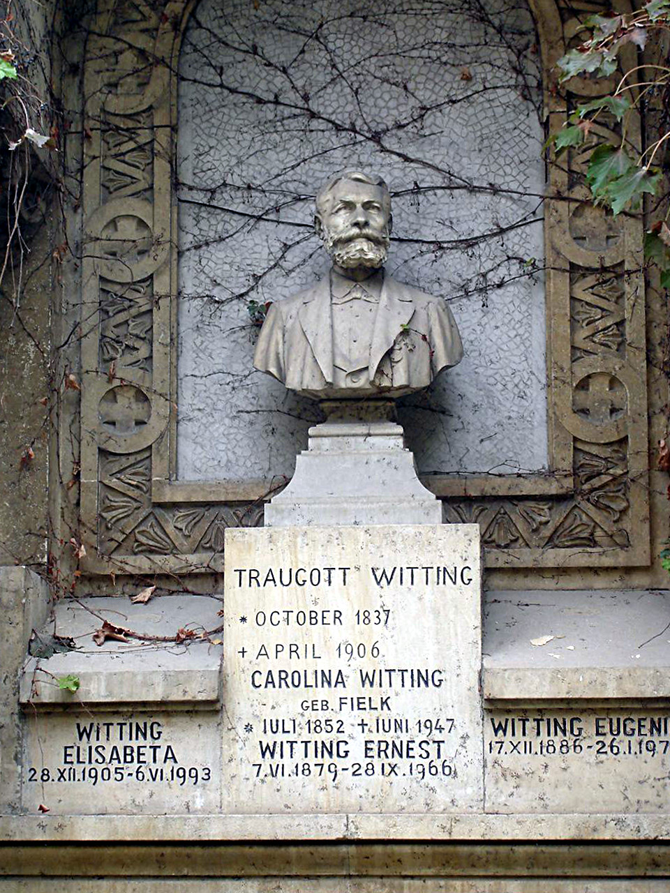 Monumentul funerar Traugott Witting, în Cimitirul Evanghelic București, realizat de sculptorul Carol Storck în 1906.